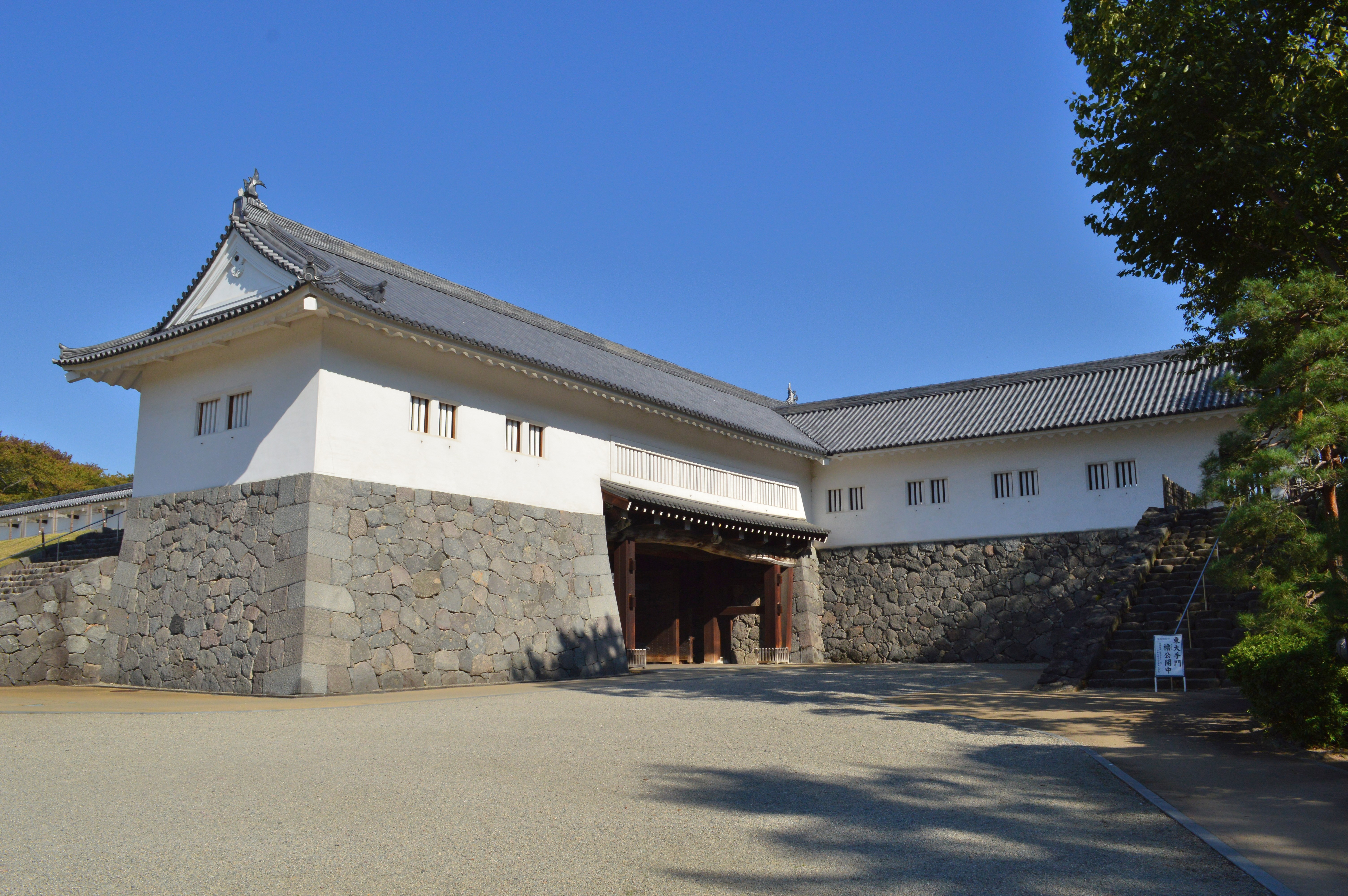 山形城 二の丸東大手門